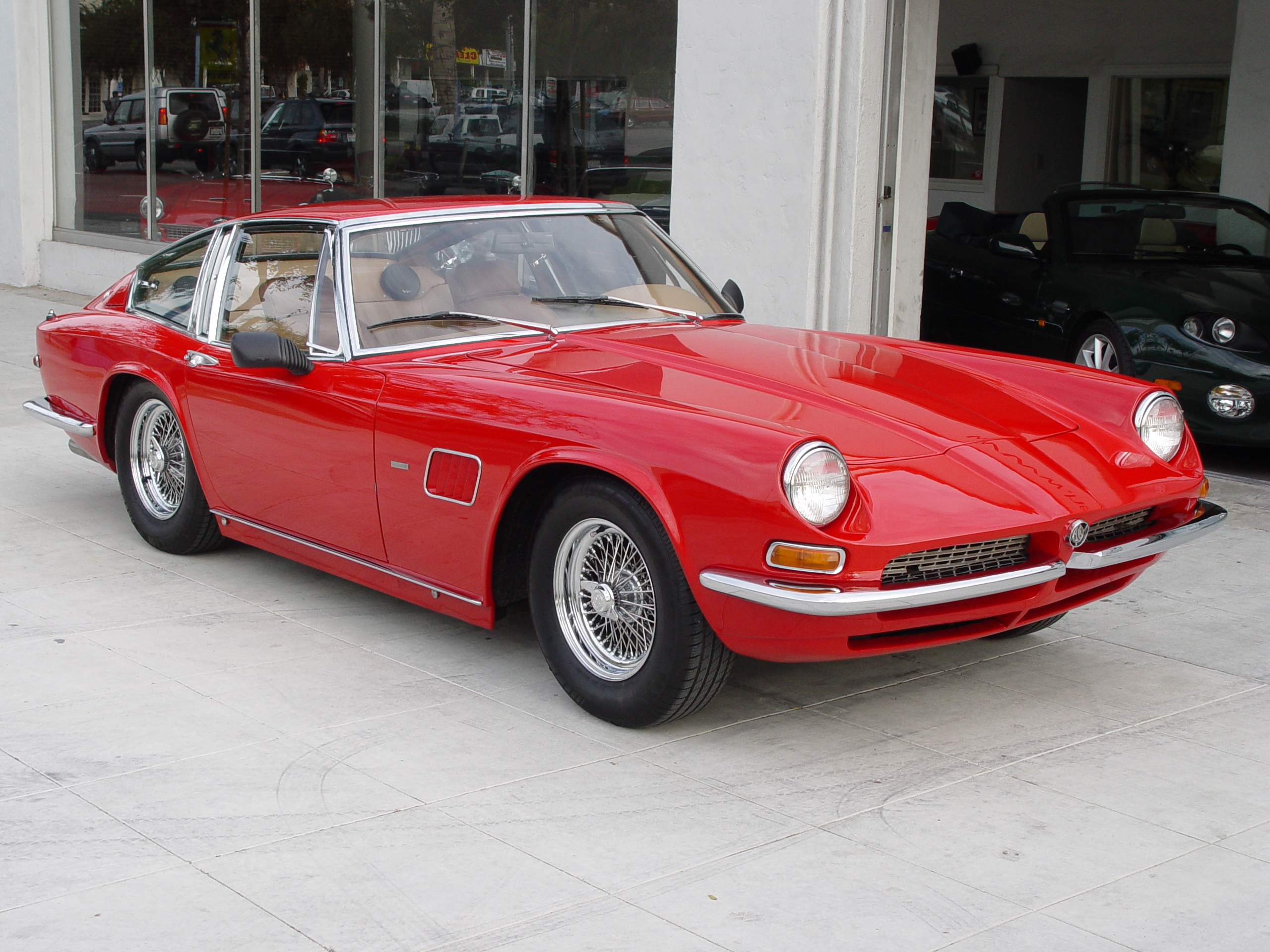 1968 AC Frua coupe